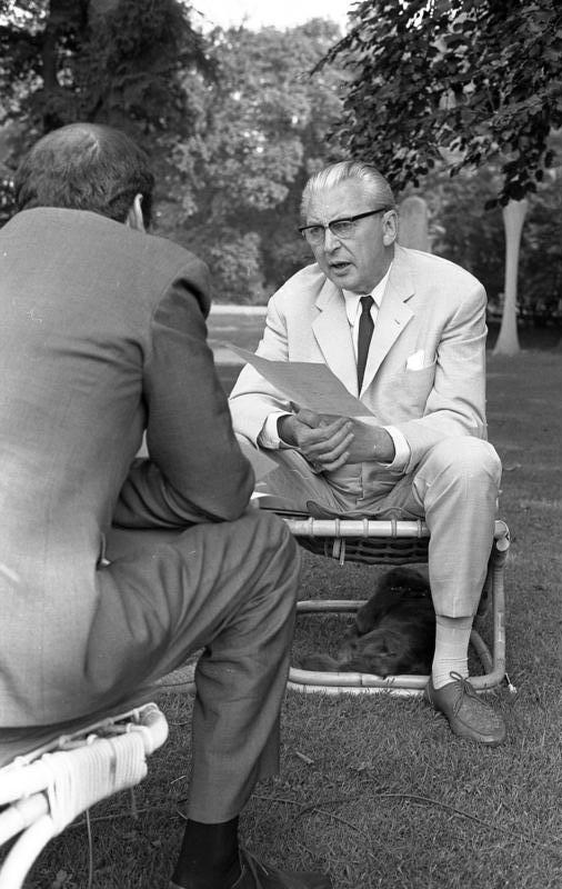 6.9.1969 Office de Radiodiffusion Télévision Francaise (ORTF) Interview mit Bundeskanzler Kurt Georg Kiesinger